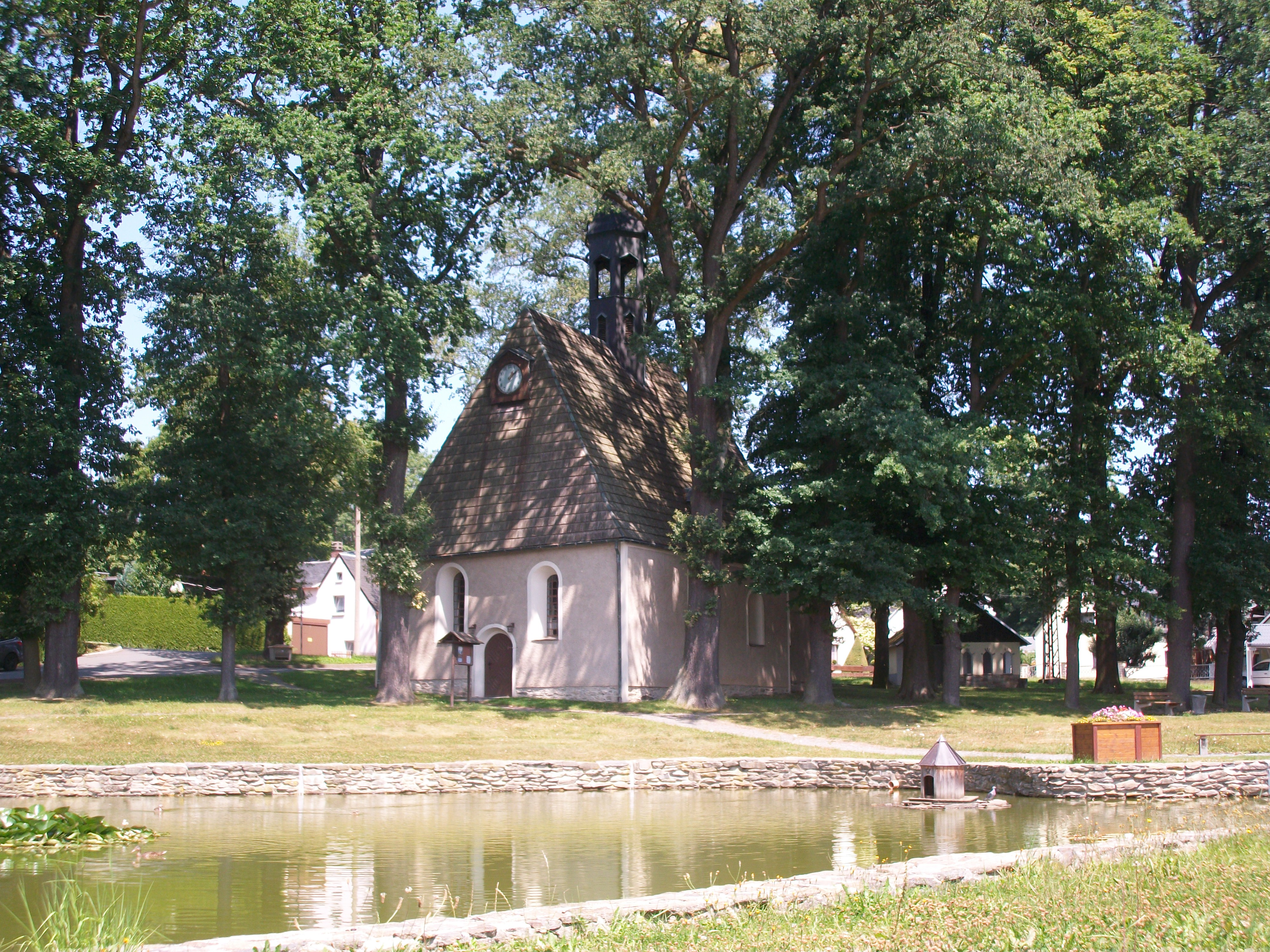 Kirche Tirpersdorf